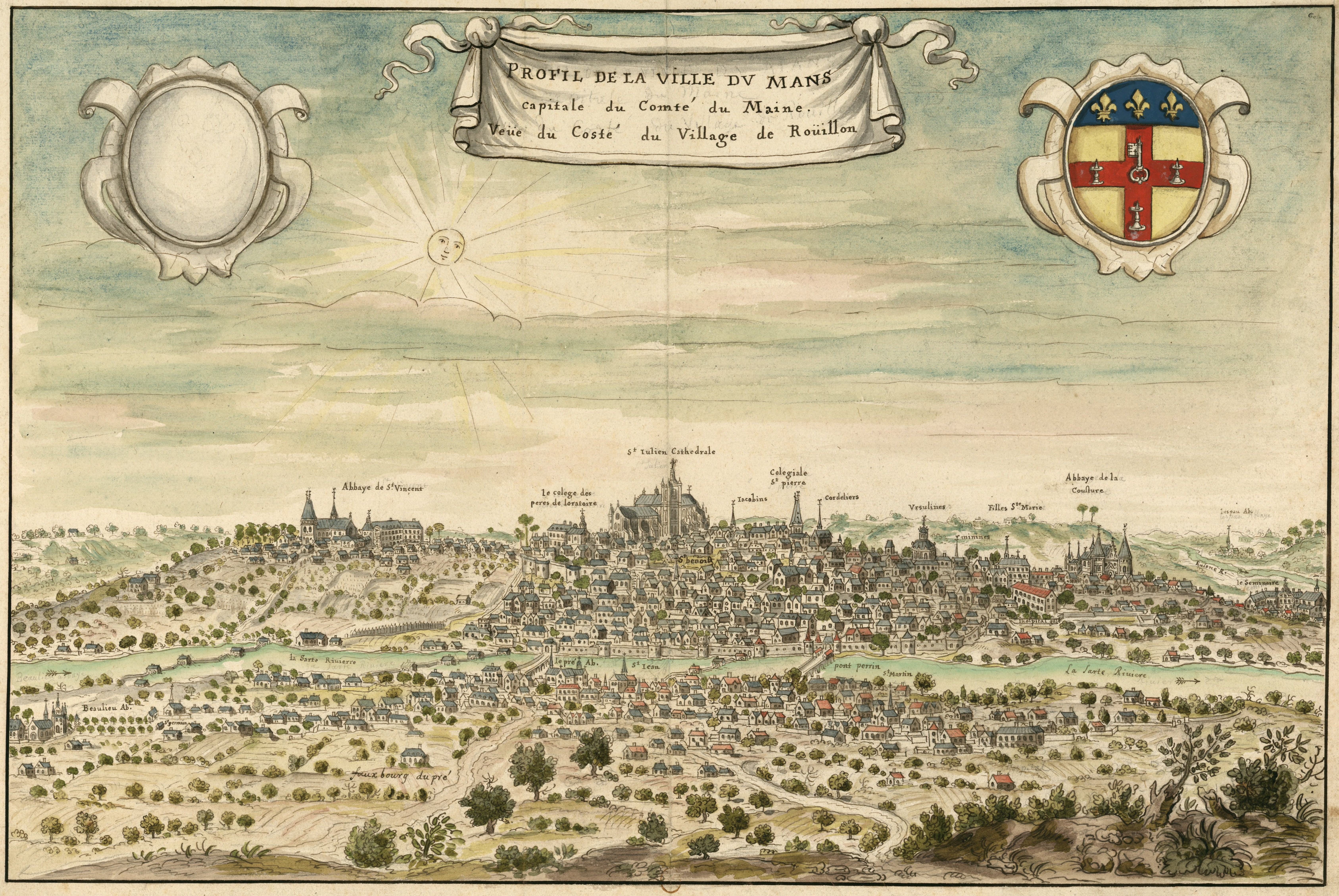 Profil de la ville du Mans, capitale du Comté du Maine. Veüe du Costé du Village de Roüillon.